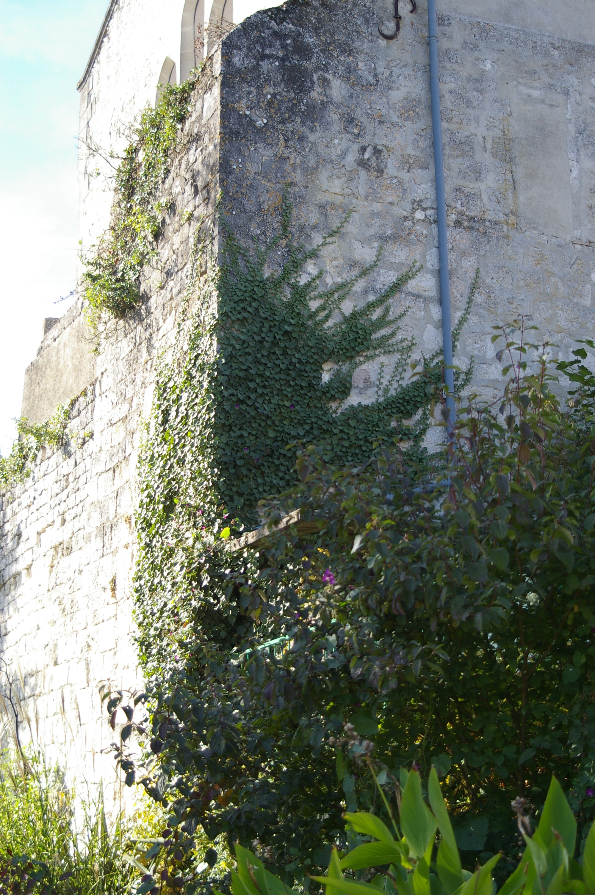 Remparts et église de Soumensac XIIe siècle Photo prise Novembre 2006 Auteur Annie Collin